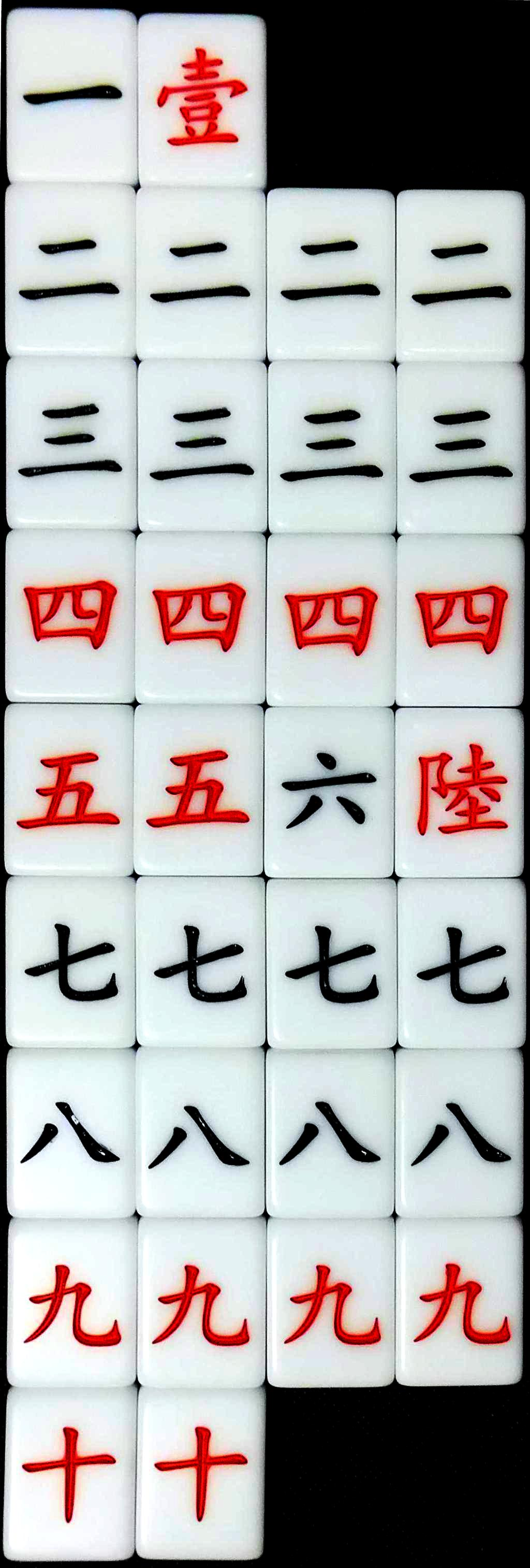 五十老牌具